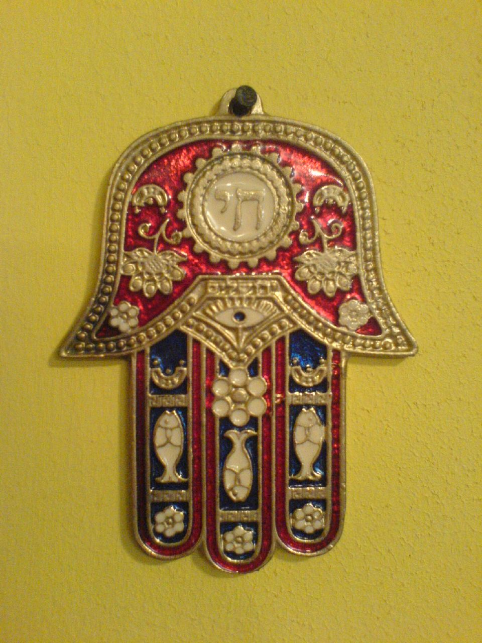 חמסה עם עין, דגים, המילה "חי" וקישוטי צמחים. Ladino: Hamsa de metal en una pared, kon una palavra en ivrit, Hai - "Bivo".